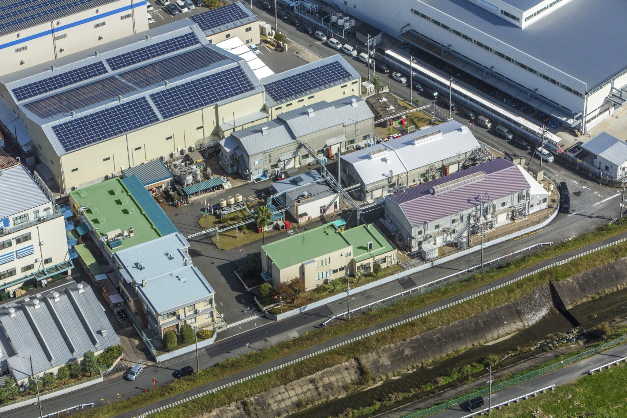 枚方工場 空撮